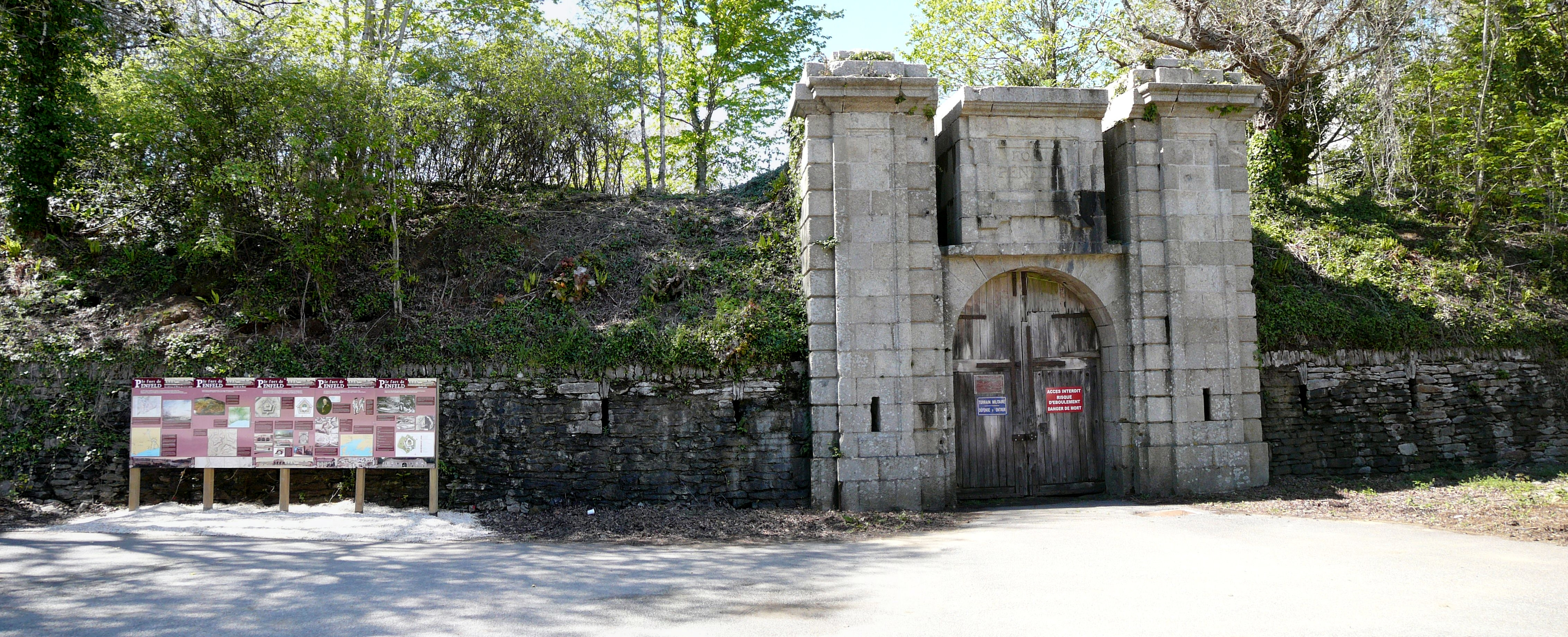 Fort de Penfeld con tabelle